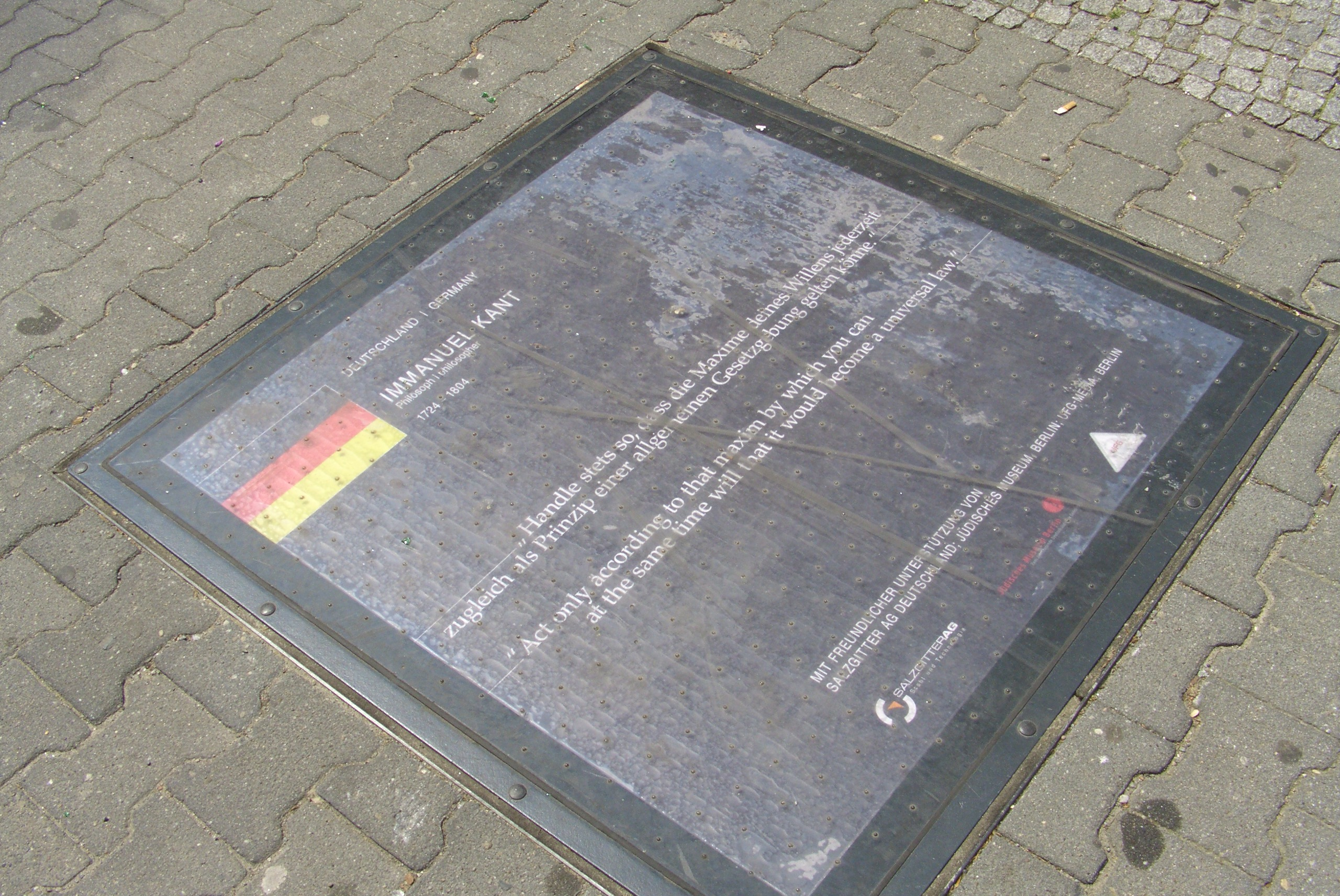 Einweihung Pfad der Visionäre - Tafel der Bundesrepublik Deutschland